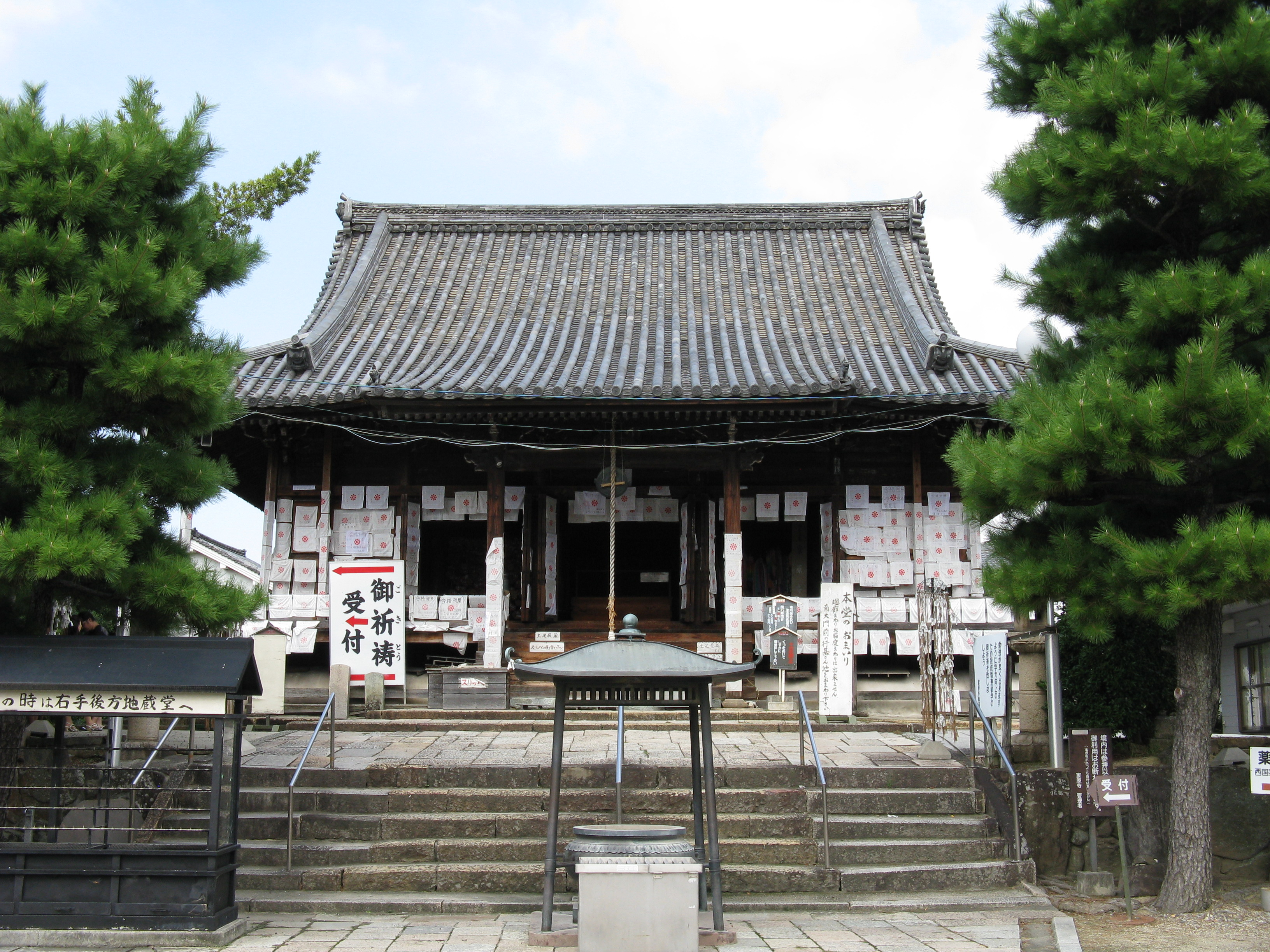 家原寺 本堂